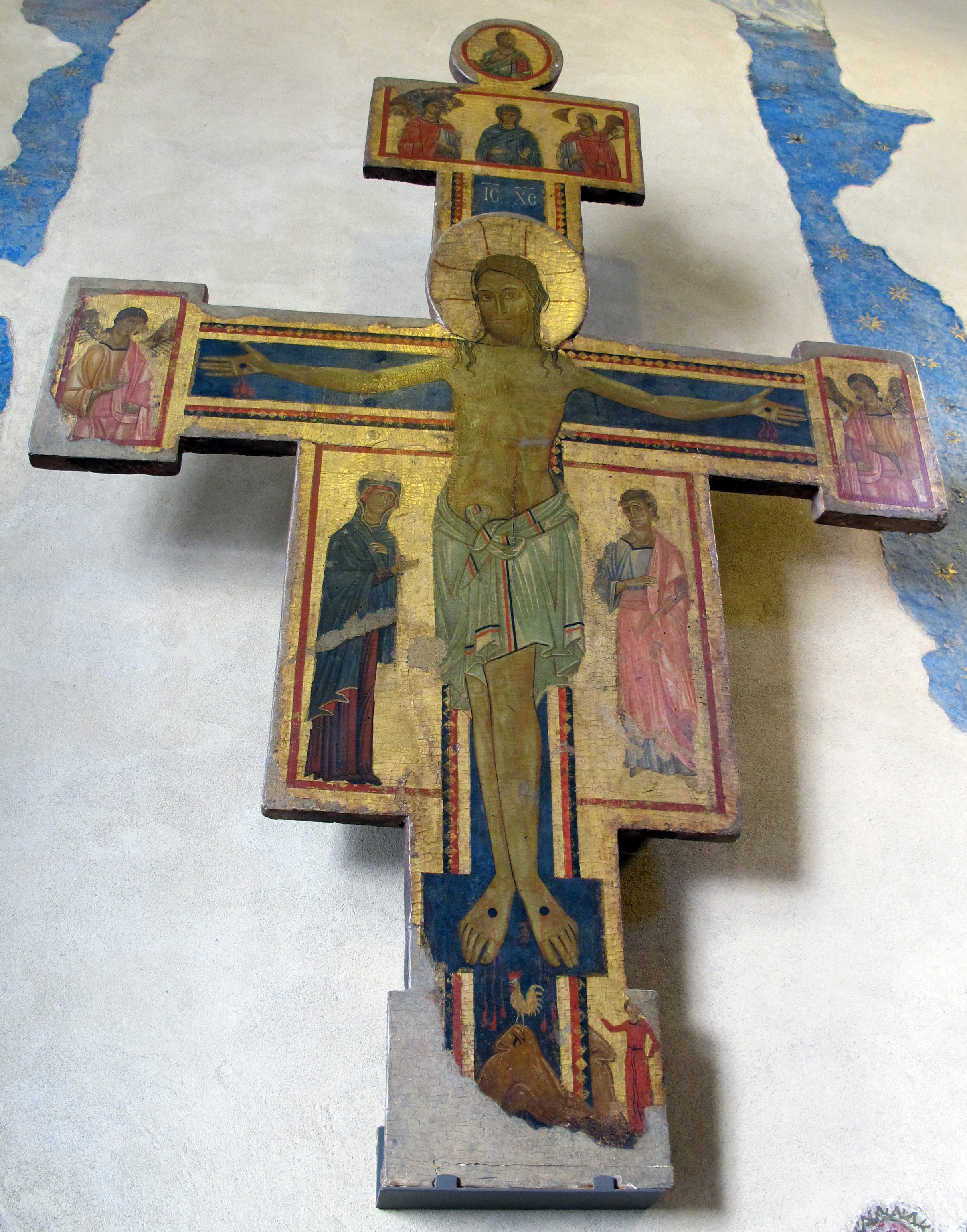 Firenze, miscellanea